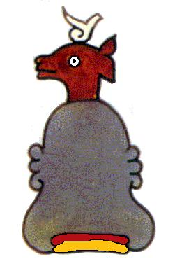 Escudo del municipio de Mazatepec, Morelos.